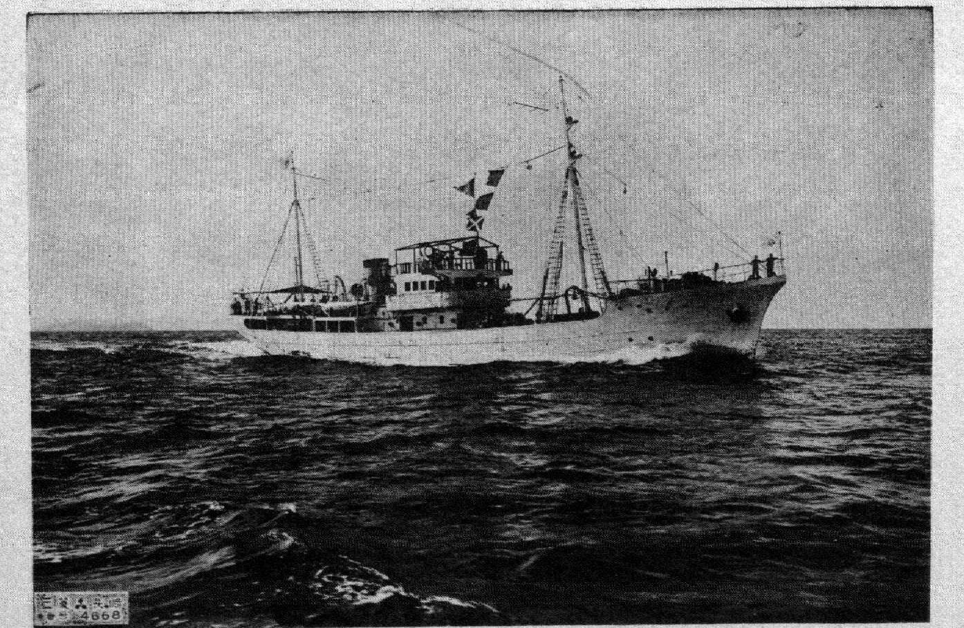 臺灣總督府水產試驗船照南丸為1931年8月由長崎三菱造船場建造，9月竣工，進行近海漁業試驗與研究